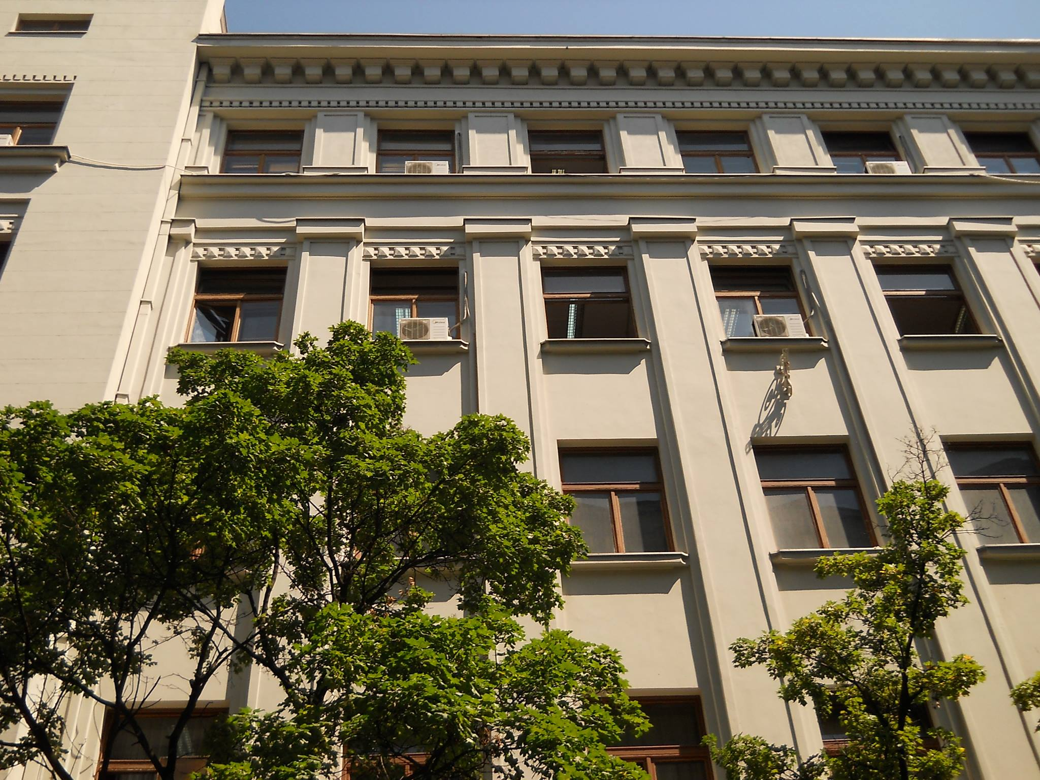 Трговачка школа, бочна страна